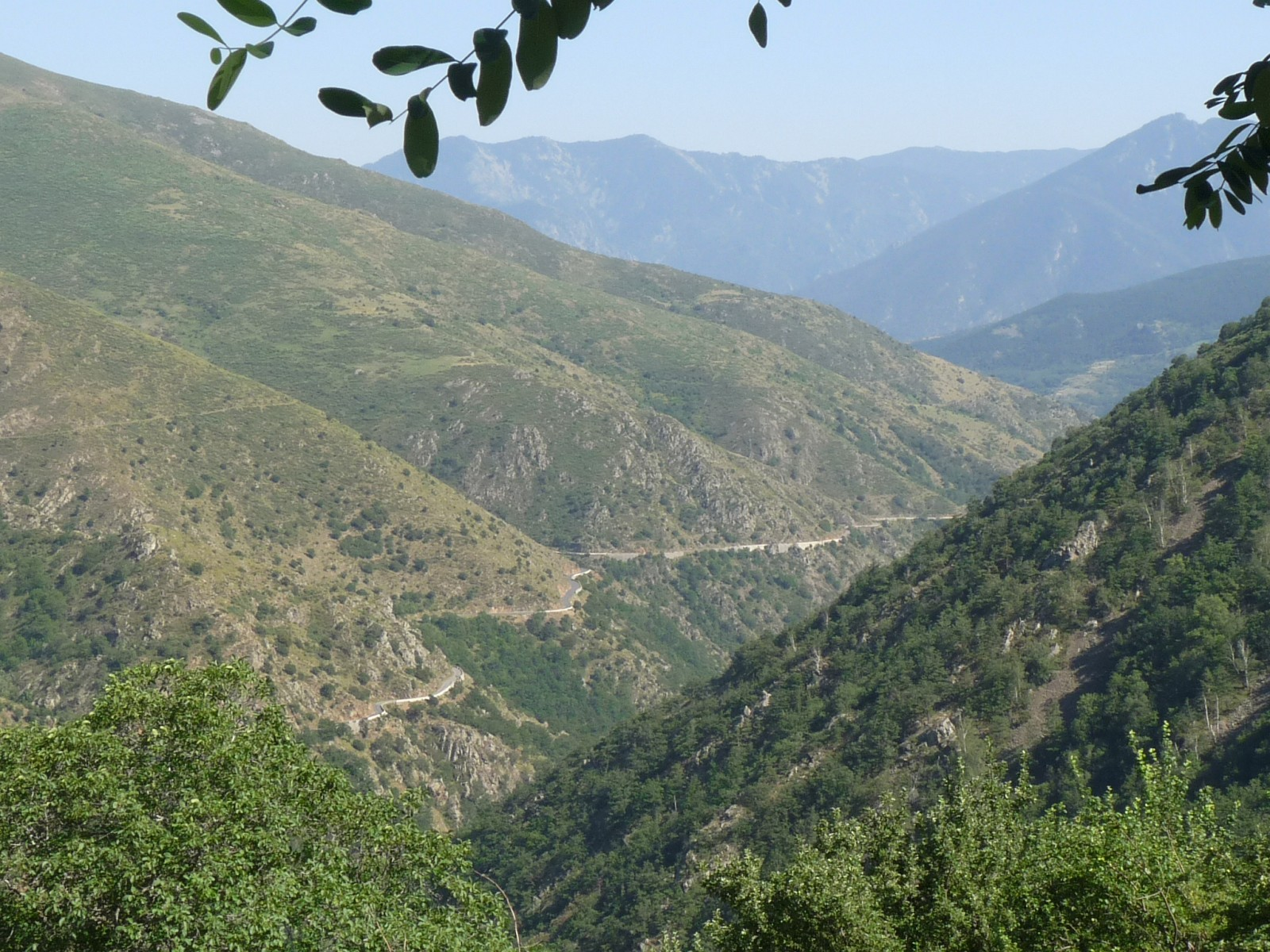 Les Garrotxes vues de Railleu, Pyrénées-Orientales, France